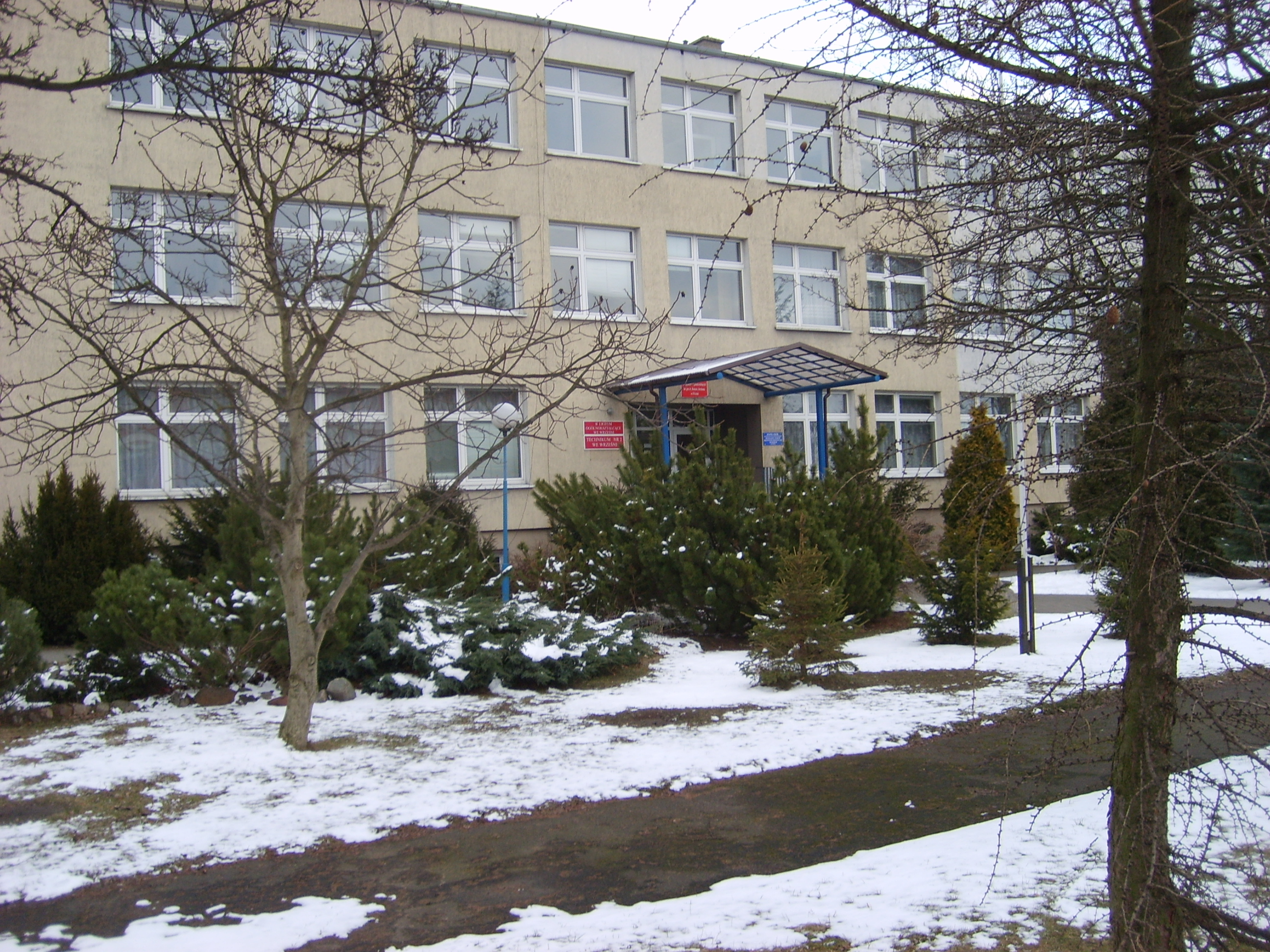 Zespół szkół technicznych i ogólnokształcących im. gen. dr. Romana Abrahama we Wrześni